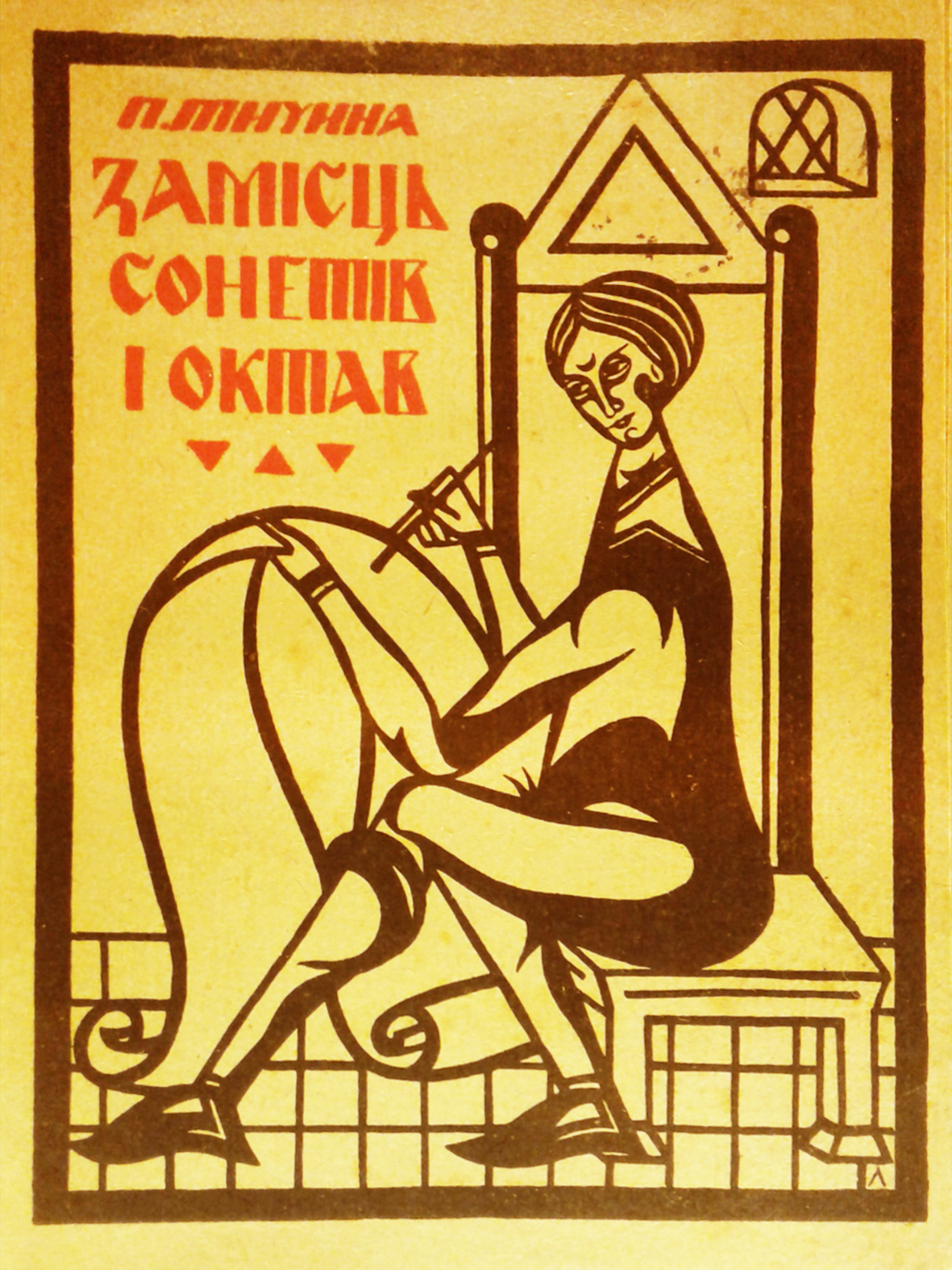 Лозовський Лесь. Обкладинка до видання П. Тичини «Замість сонетів і октав» 1920. Музей книги і друкарства